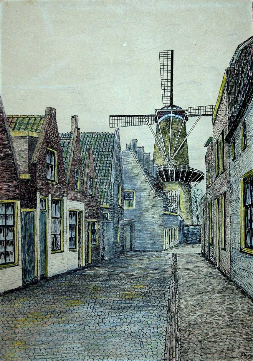 Hofje van Buytenwech te Gouda getekend door mij grootvader Dirk Hoogendoorn (1888-1971) in 1952